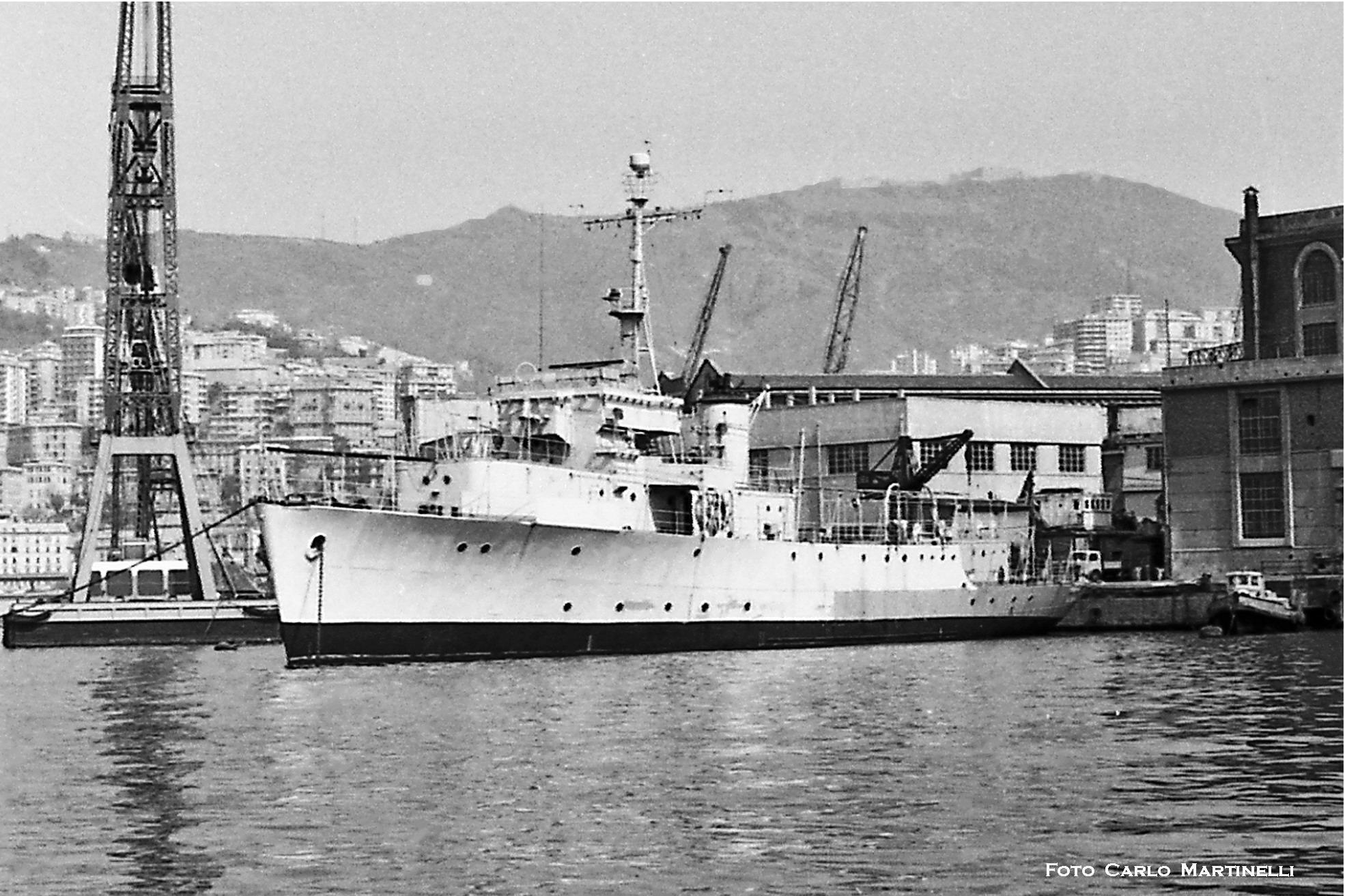 L'ultima Nave scuola Garaventa, la ex-corvetta Alabarda